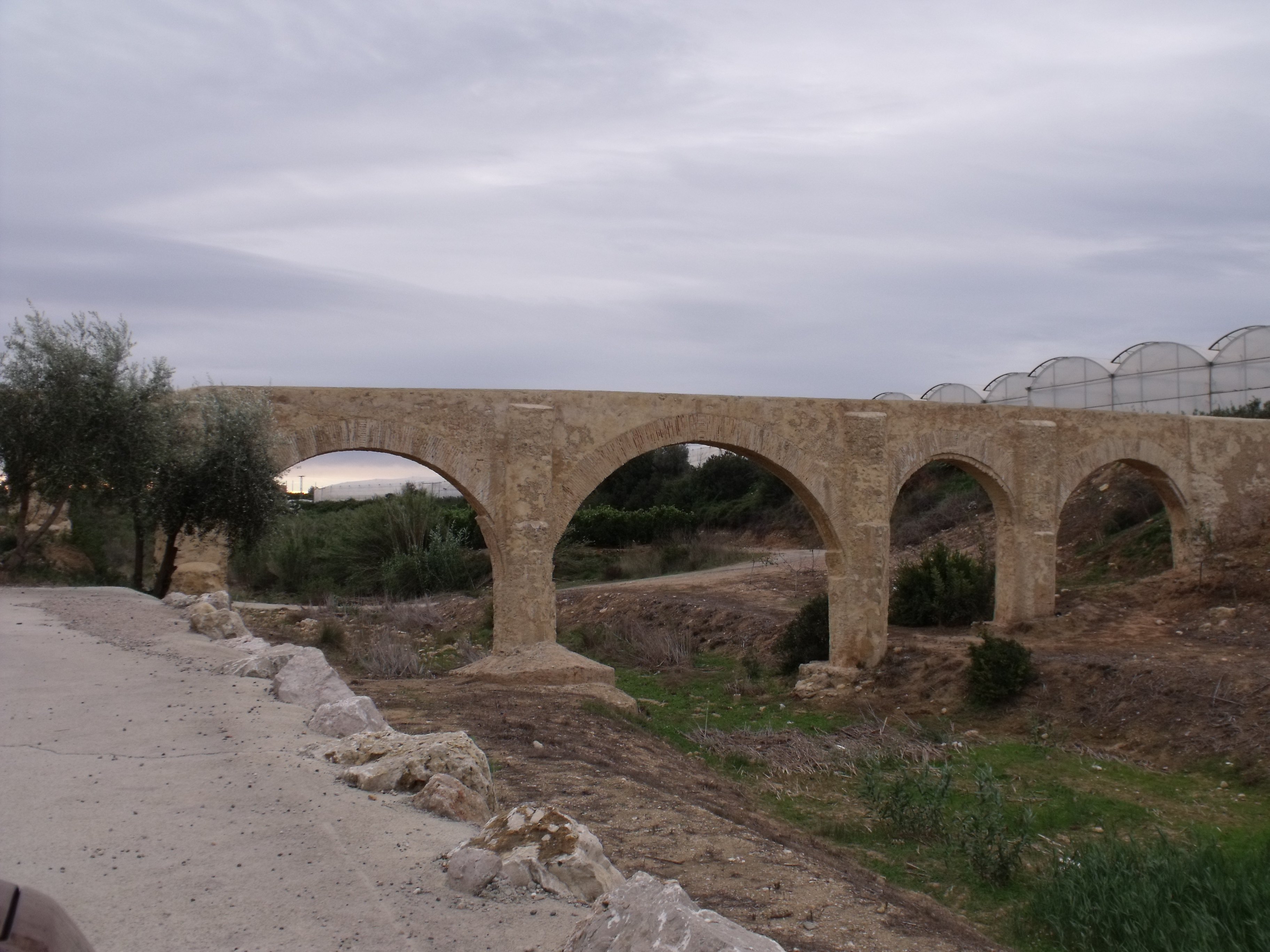 Acueducto de Arquets de Baix. Torrent, España.